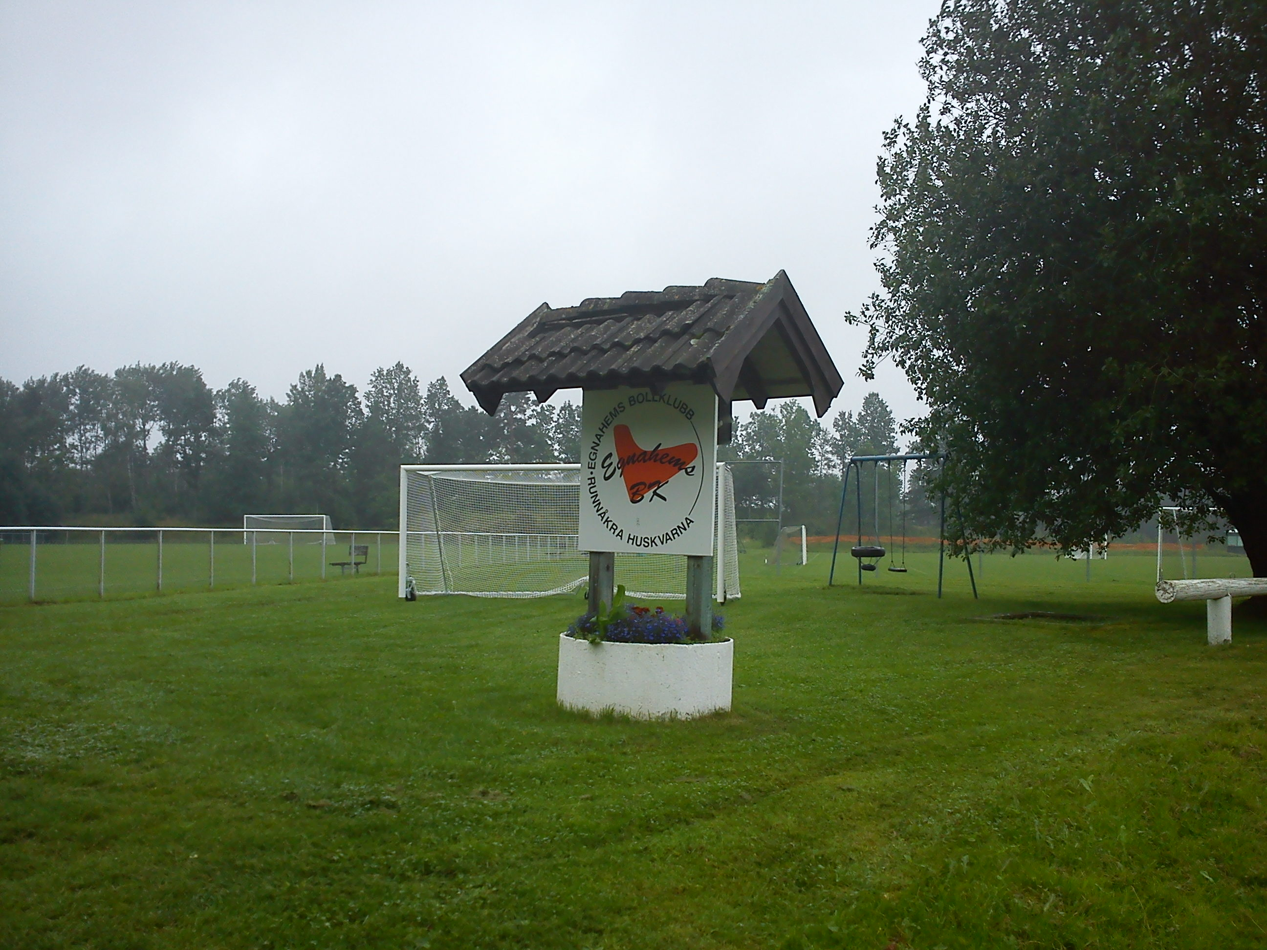 Skylt utanför Egnahems bollklubb.